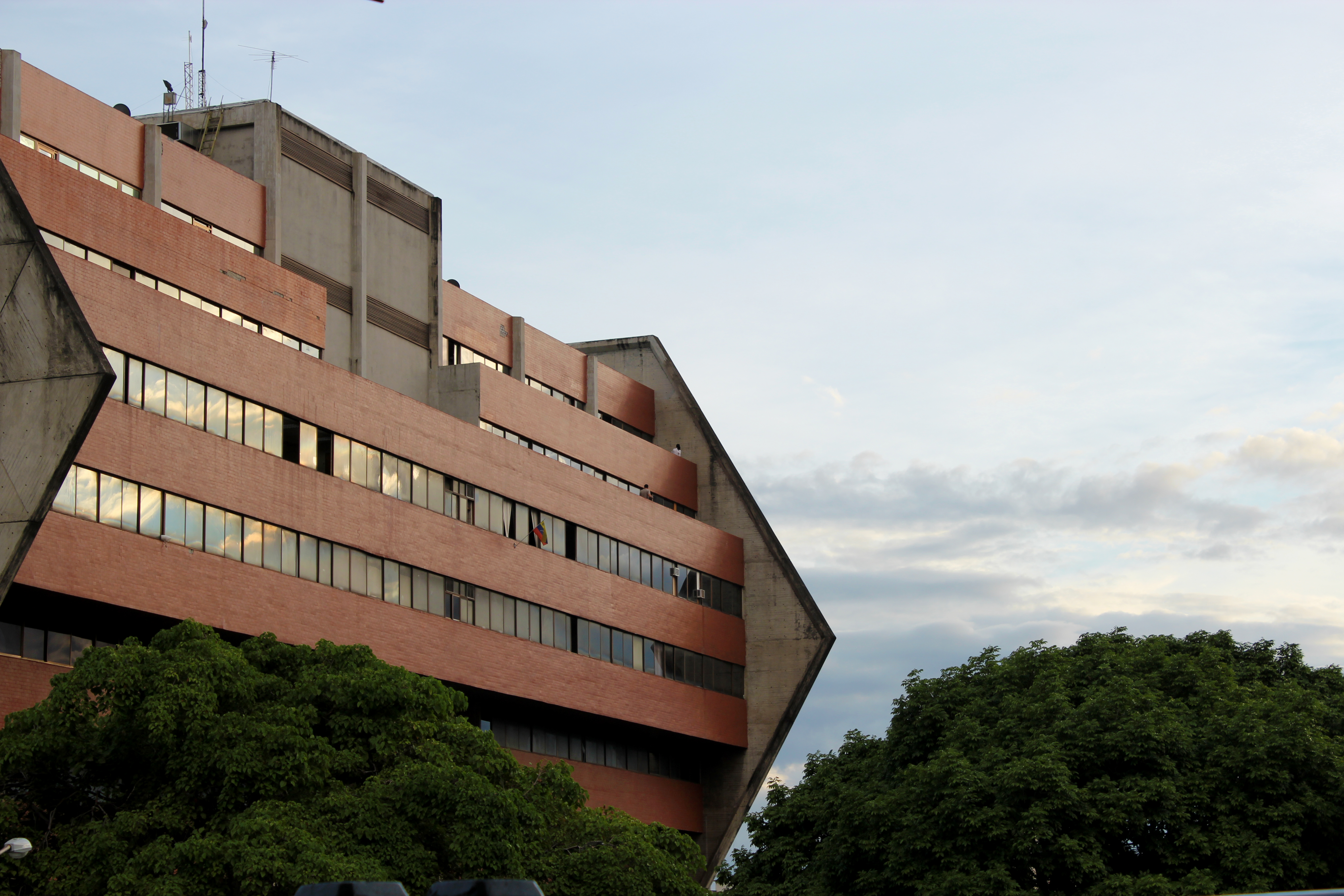 Una foto durante el venidero atardecer al viejo edificio de CorpoIndustrias, donde también funciona la Cinemateca de Maracay, cerca de Las Delicias...